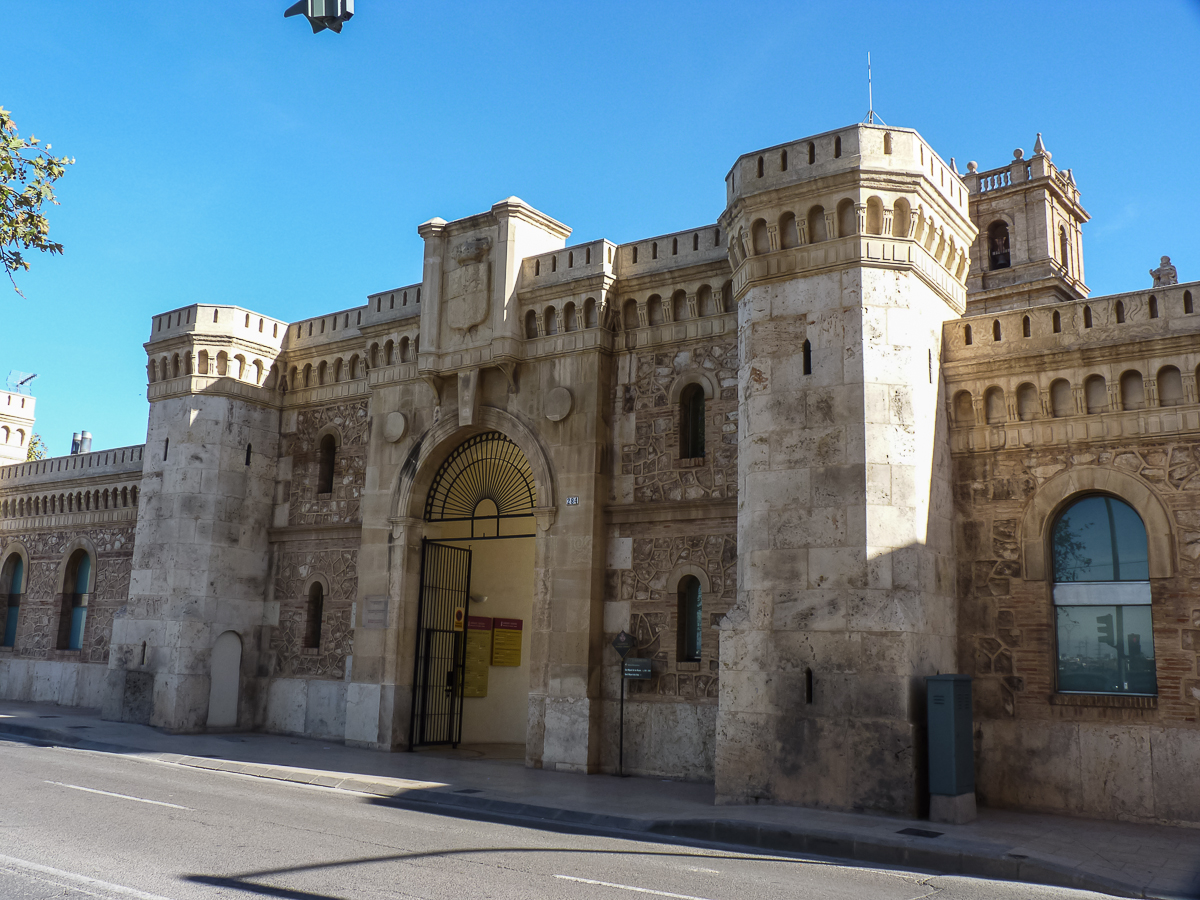 CONVENTO DE SAN MIGUEL DE LOS REYES DE VALENCIA 06122009 130023 00062.jpg